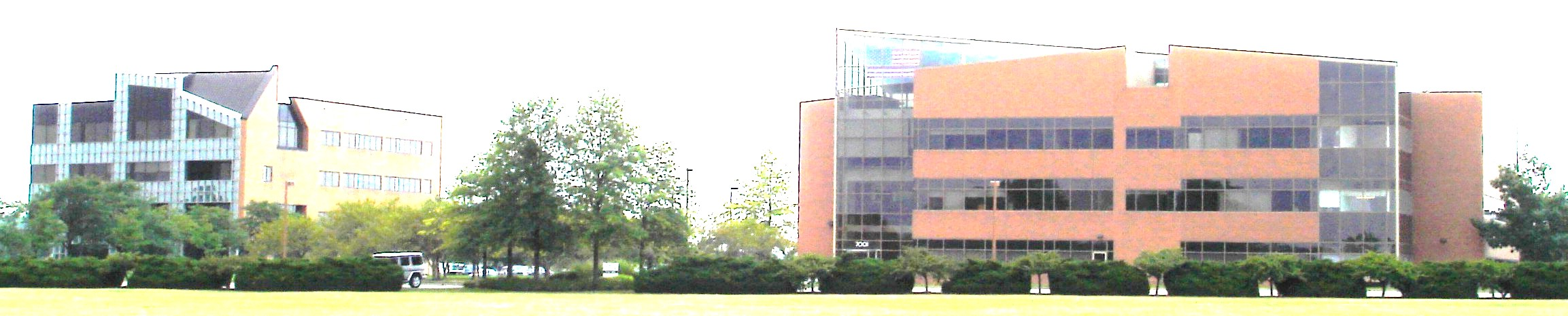 Dublin Entrepreneurial Center